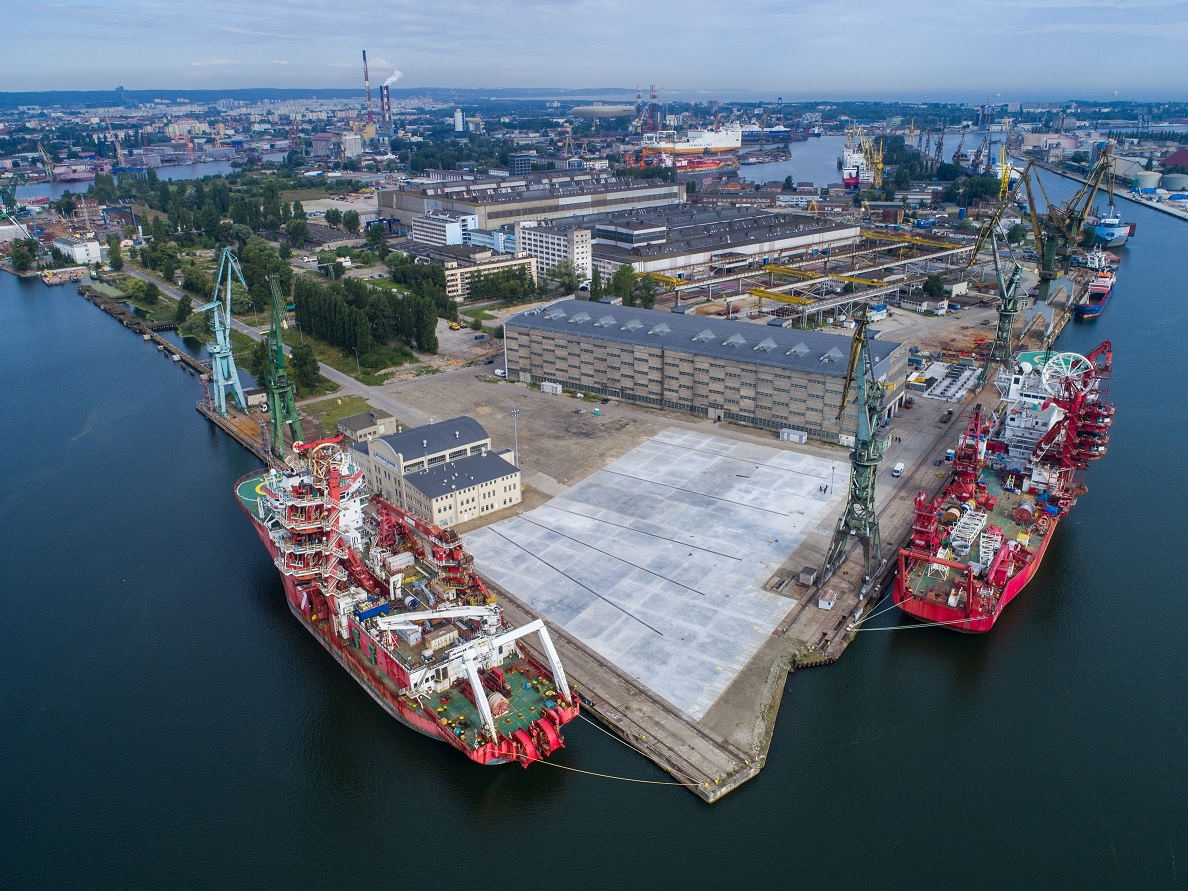 Widok płyty montażowej na Wyspie Ostrów z lotu ptaka